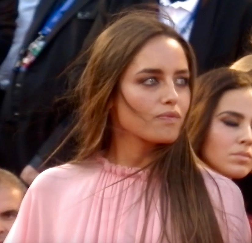 L'attrice Matilde Gioli sul red carpet del film "Jackie" nel Festival di Venezia 2016